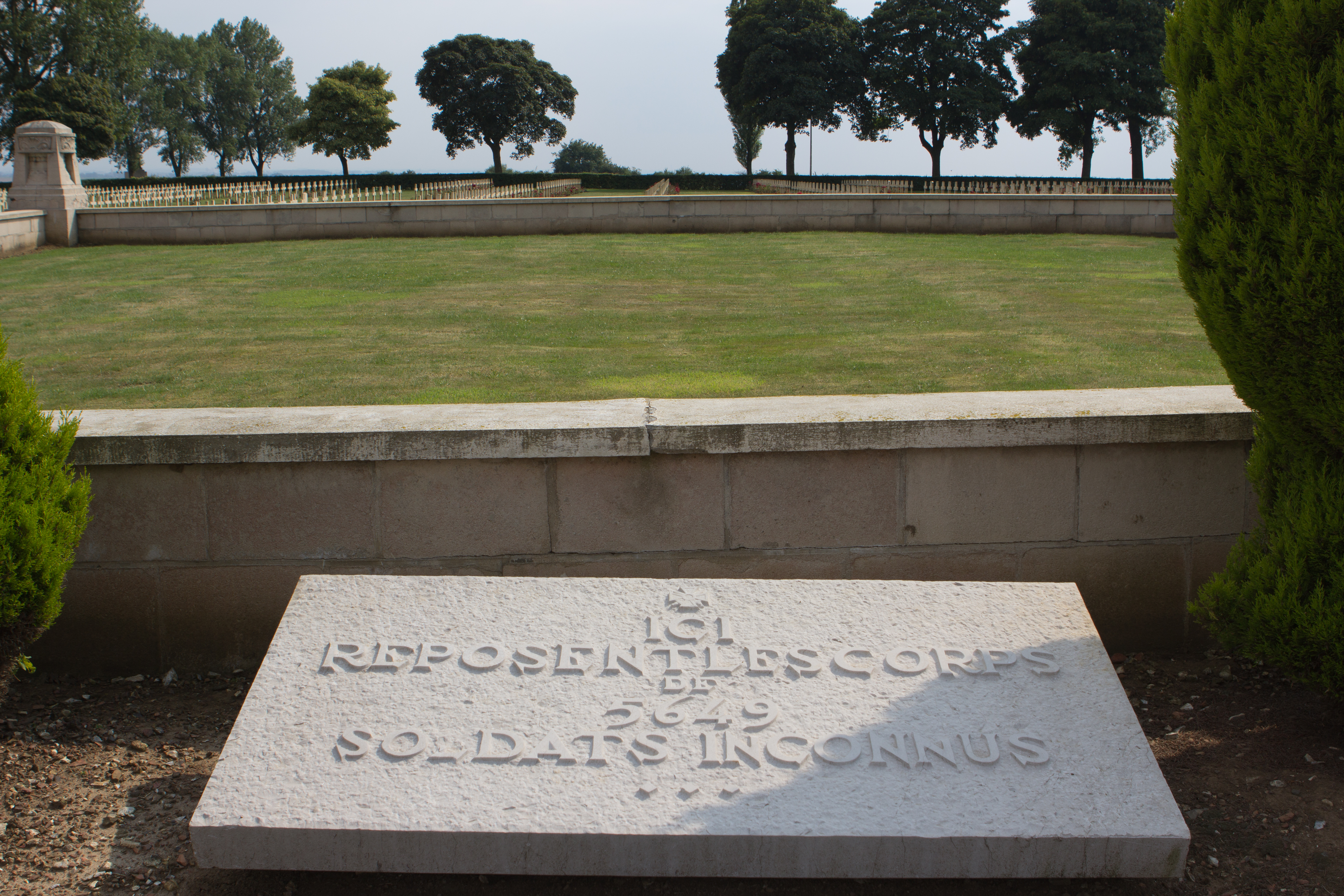 Nécropole nationale de Notre-Dame-de-Lorette / Ablain-Saint-Nazaire, Pas-de-Calais, France